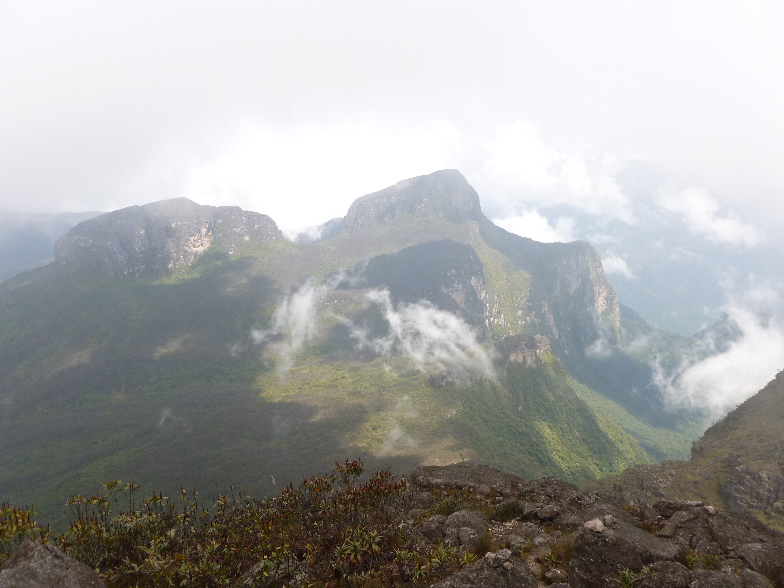 Segunda mais alta montanha do Brasil, Estado do Amazonas - Brasil